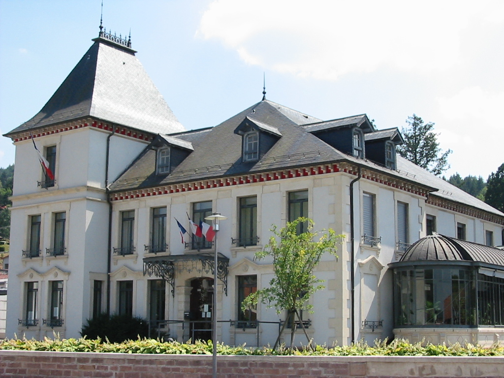 Éloyes La mairie Commune du canton de Remiremont (Vosges) Photo personnelle du 15 juillet 2006. Copyright © Christian Amet